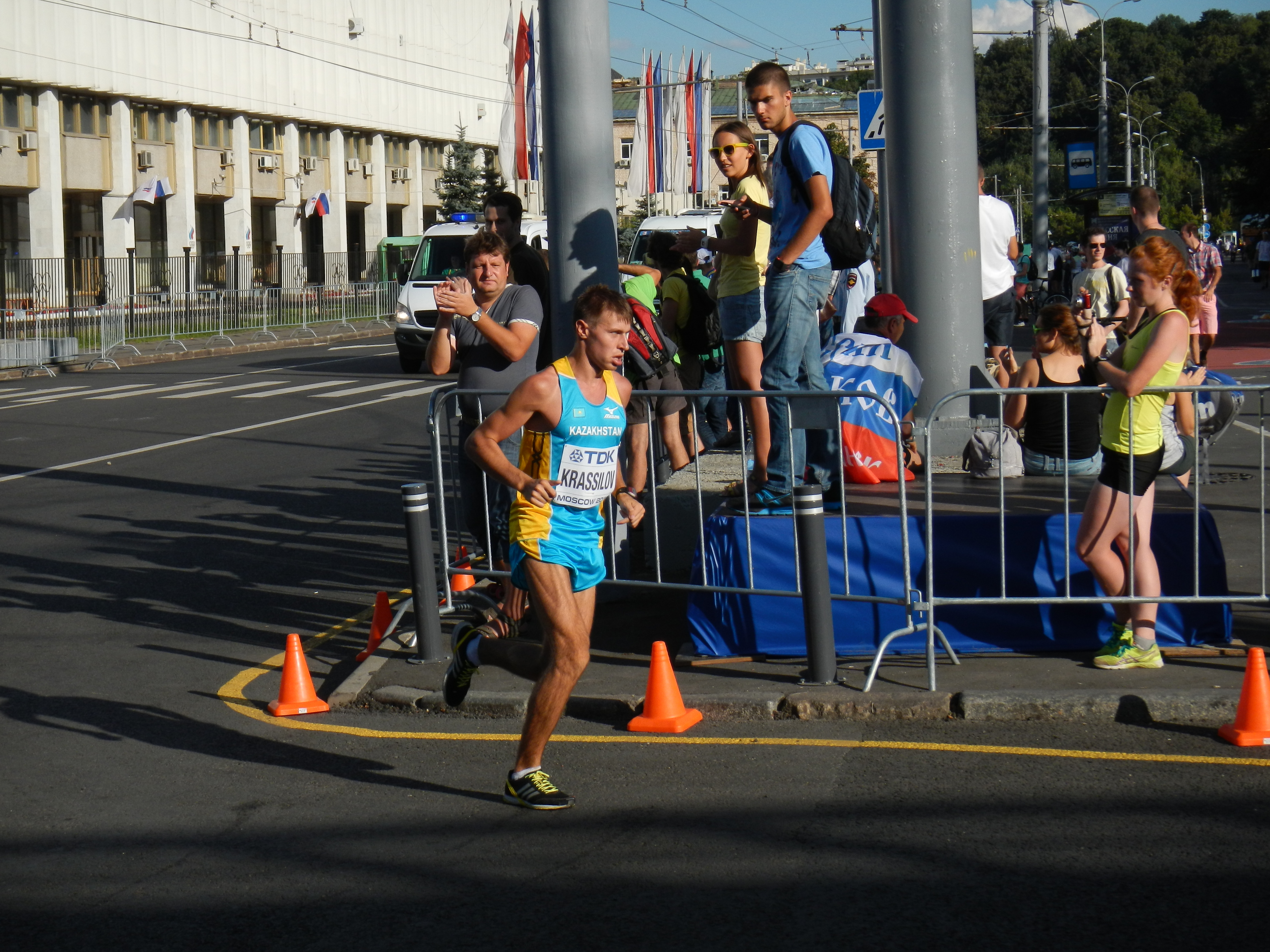 51 (694) Mihail Krassilov (Михаил Красилов) (Kazakhstan) 2:44:31